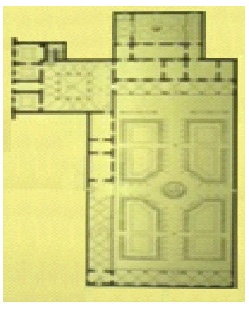 Tekening door Filippo Brunelleschi (Italian architect, sculptor, 1377-1446)